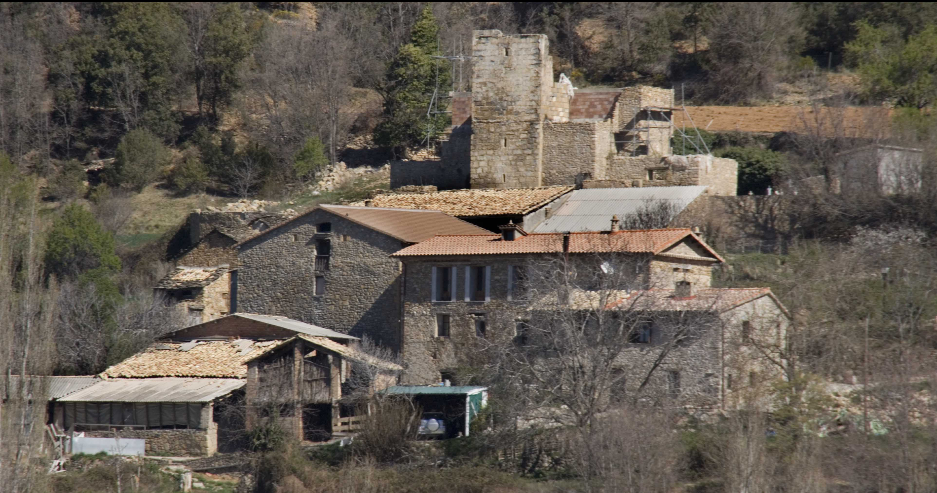 Poblet del municipi d'Isàvena, a la Ribagorça Aragonesa, als peus del Coll de Vent, de la serra del Cis (Sierra de Sis)